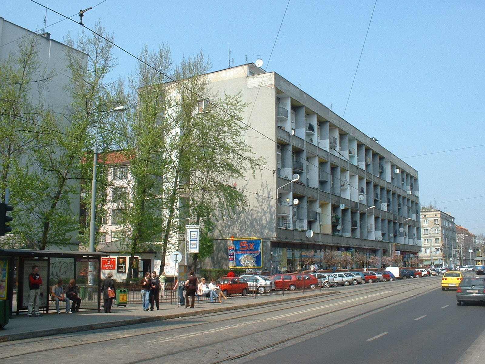 Maisonette house by Jadwiga Grabowska-Hawrylak, Edmund Frąckiewicz, Maria and Igor Tawryczewski. Kołłątaja Street 9-12 in Wroclaw.